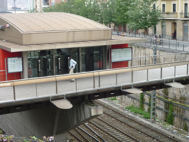 Acceso a la estación de Zabalburu